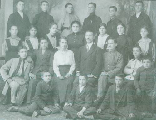 Коста Николов сред учениците си.